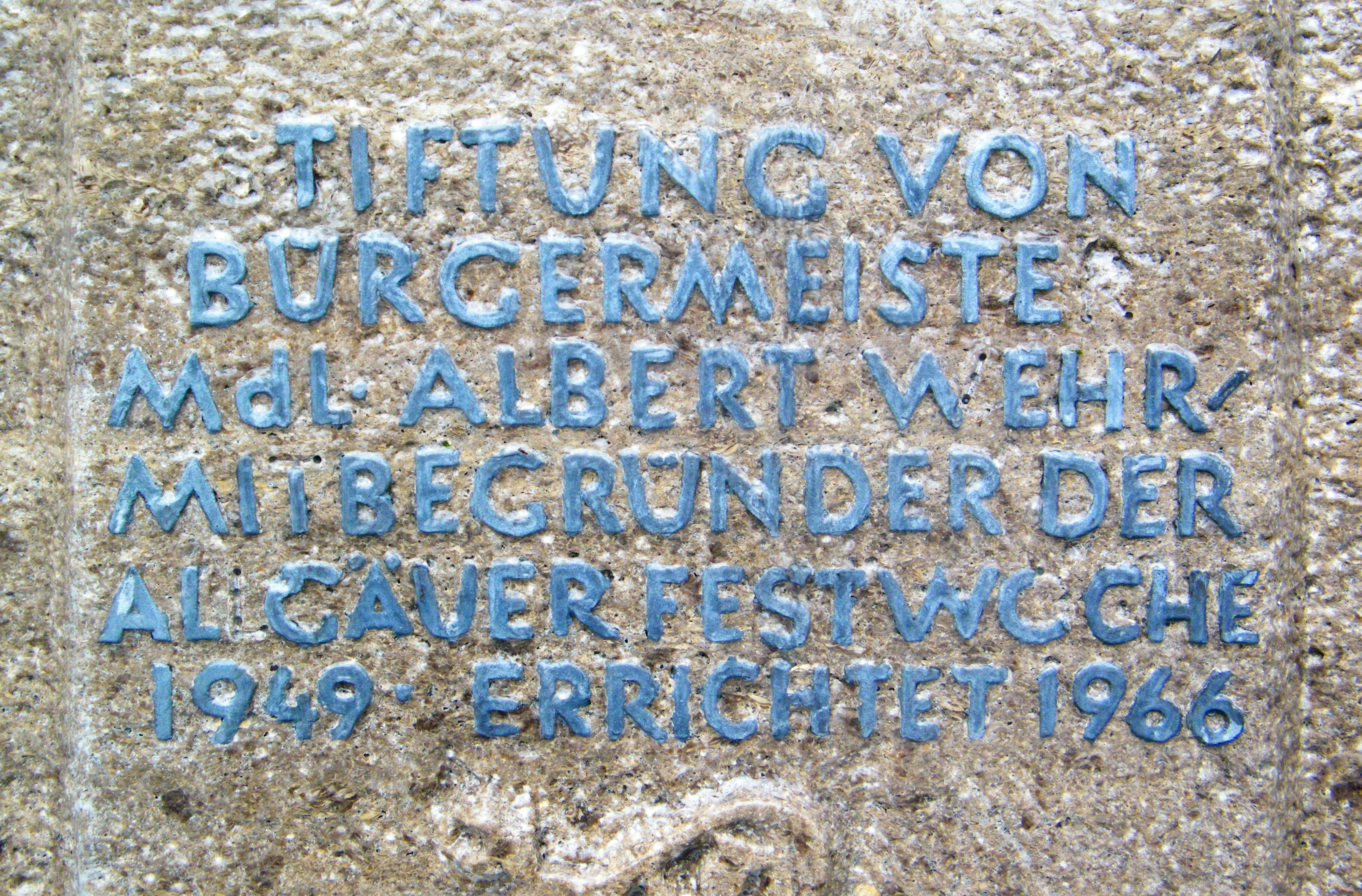 Aufschrift am Festwochenbrunnen STIFTUNG VON BÜRGERMEISTER MdL ALBERT WEHR MITBEGRÜNDER DER ALLGÄUER FESTWOCHE 1949 ERRICHTET 1966